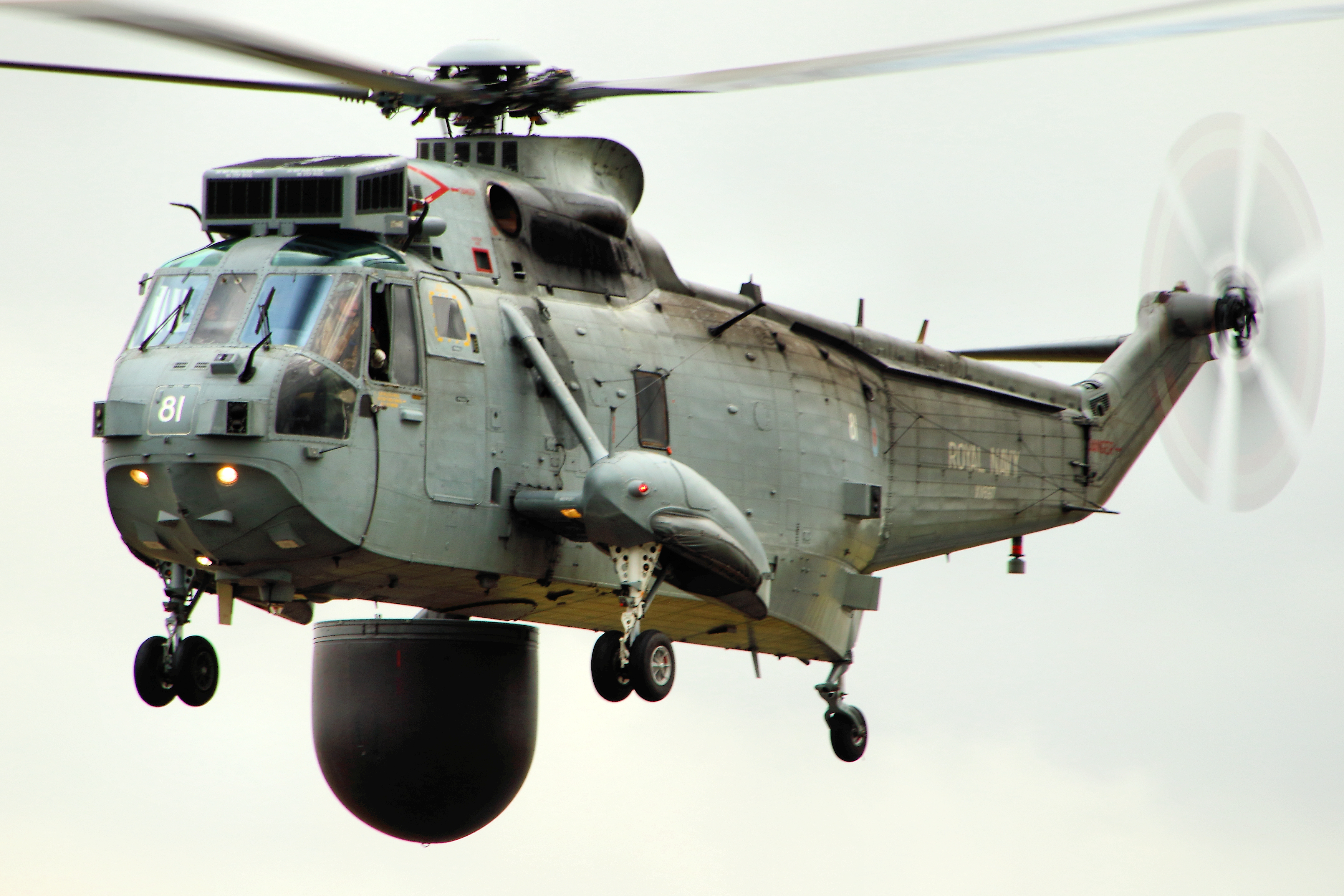 Sea King - RIAT 2015